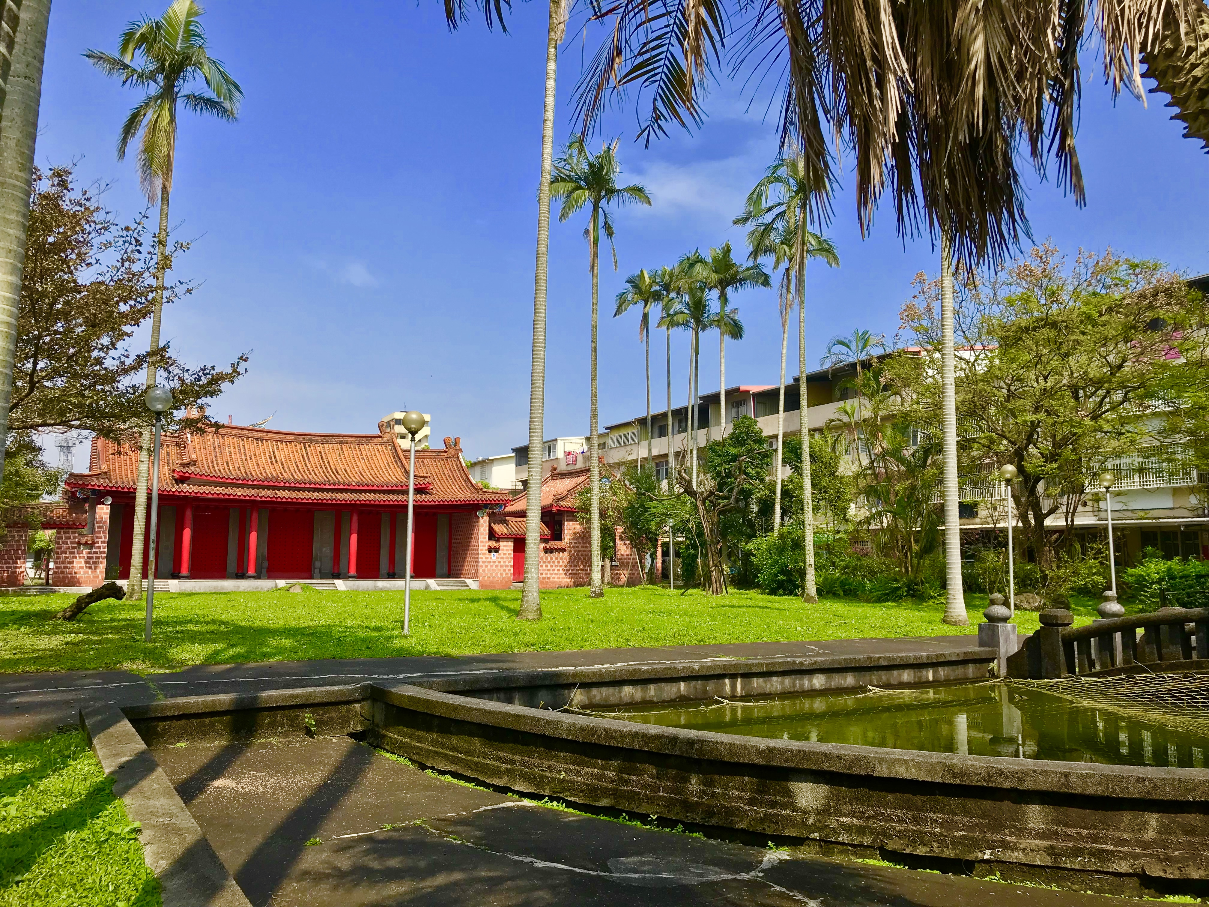 中文（台灣）: 宜蘭孔子廟泮池至檽星門間大草坪